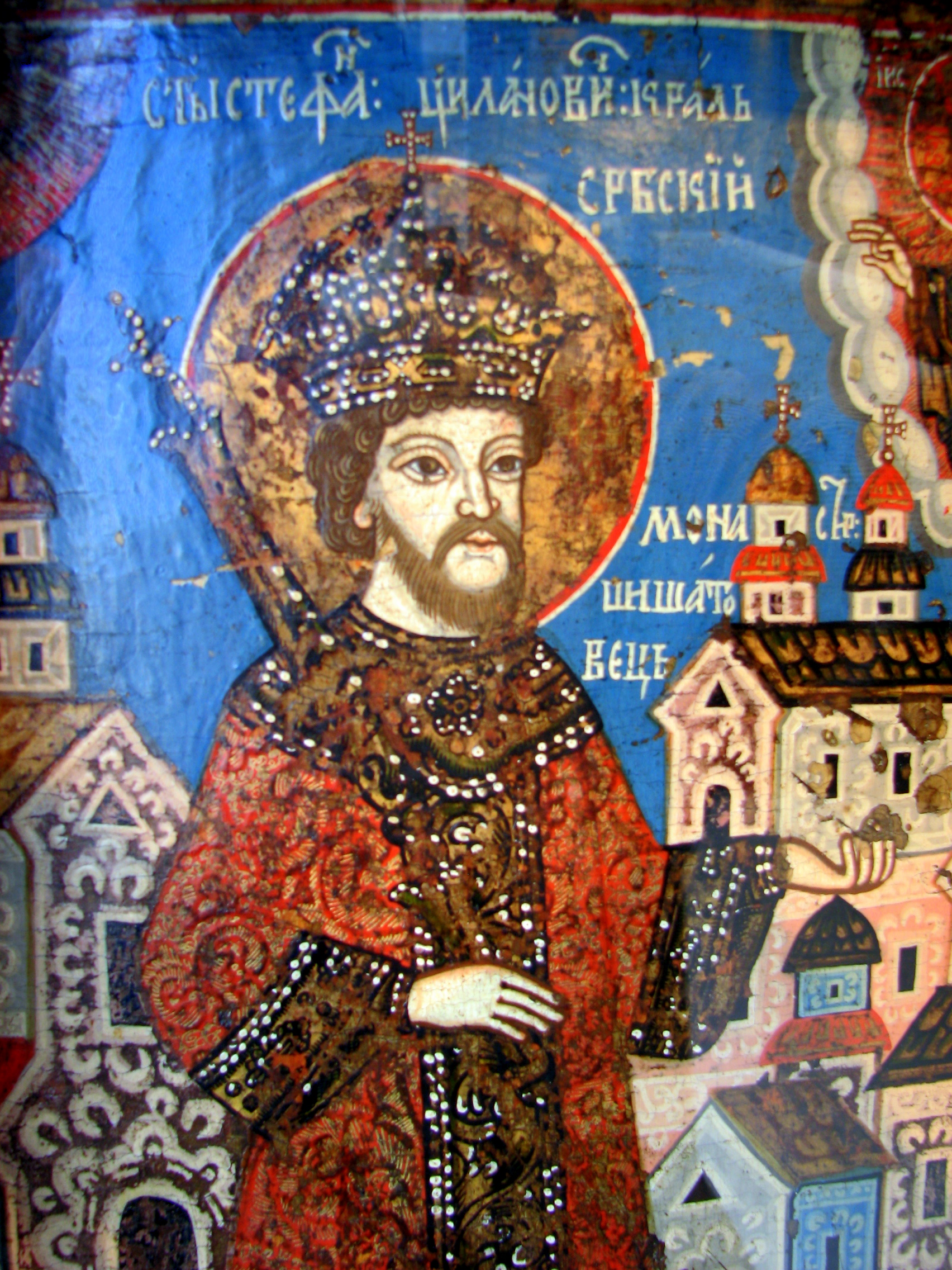 Свети Стефан Штиљановић Аутор: Станоје Поповић Рад: Темпера на дрвету Насликано: 1740. године